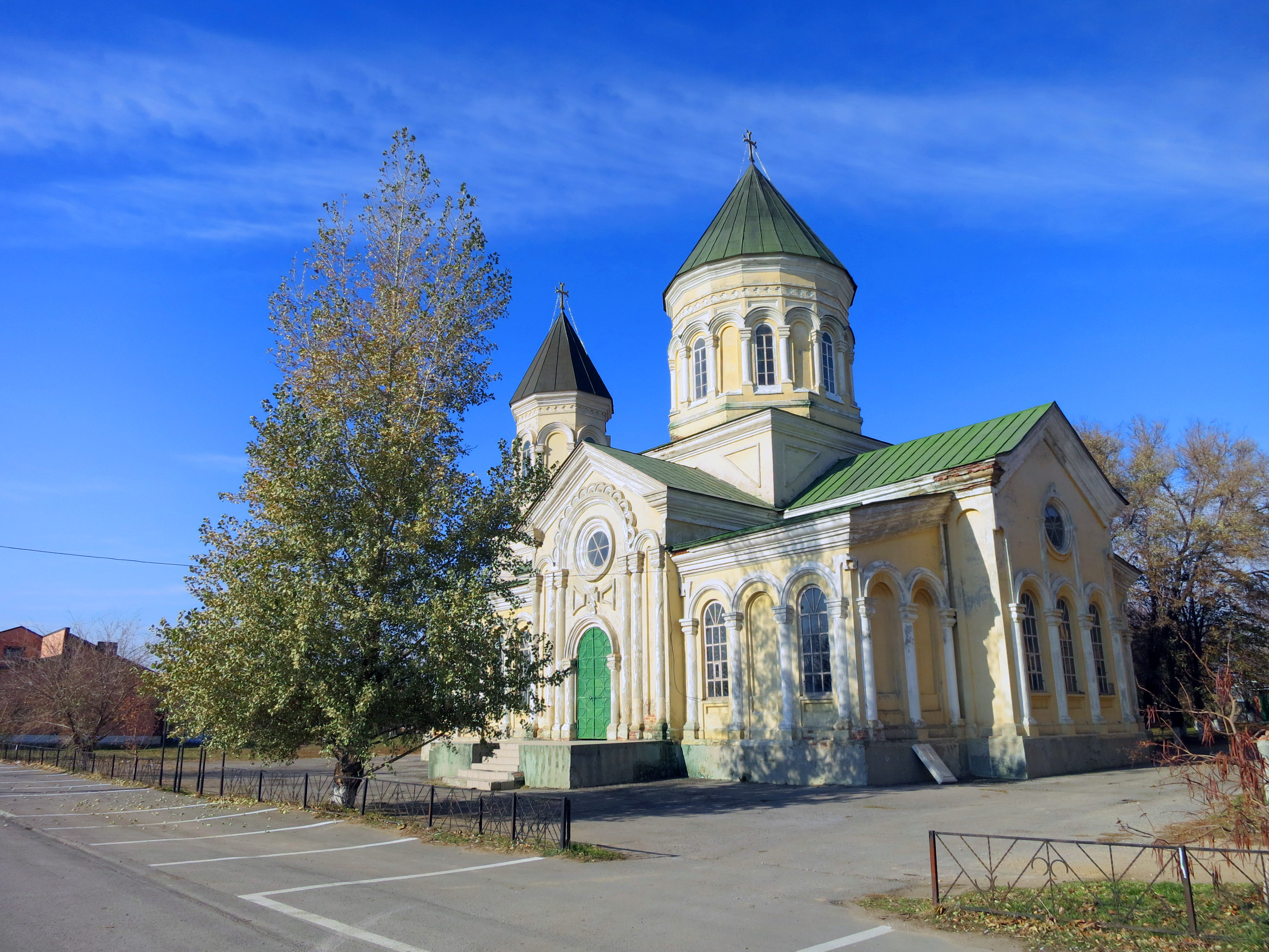 Церковь Сурб-Аменапркич: центр, Крым, Мясниковский район, Ростовская область